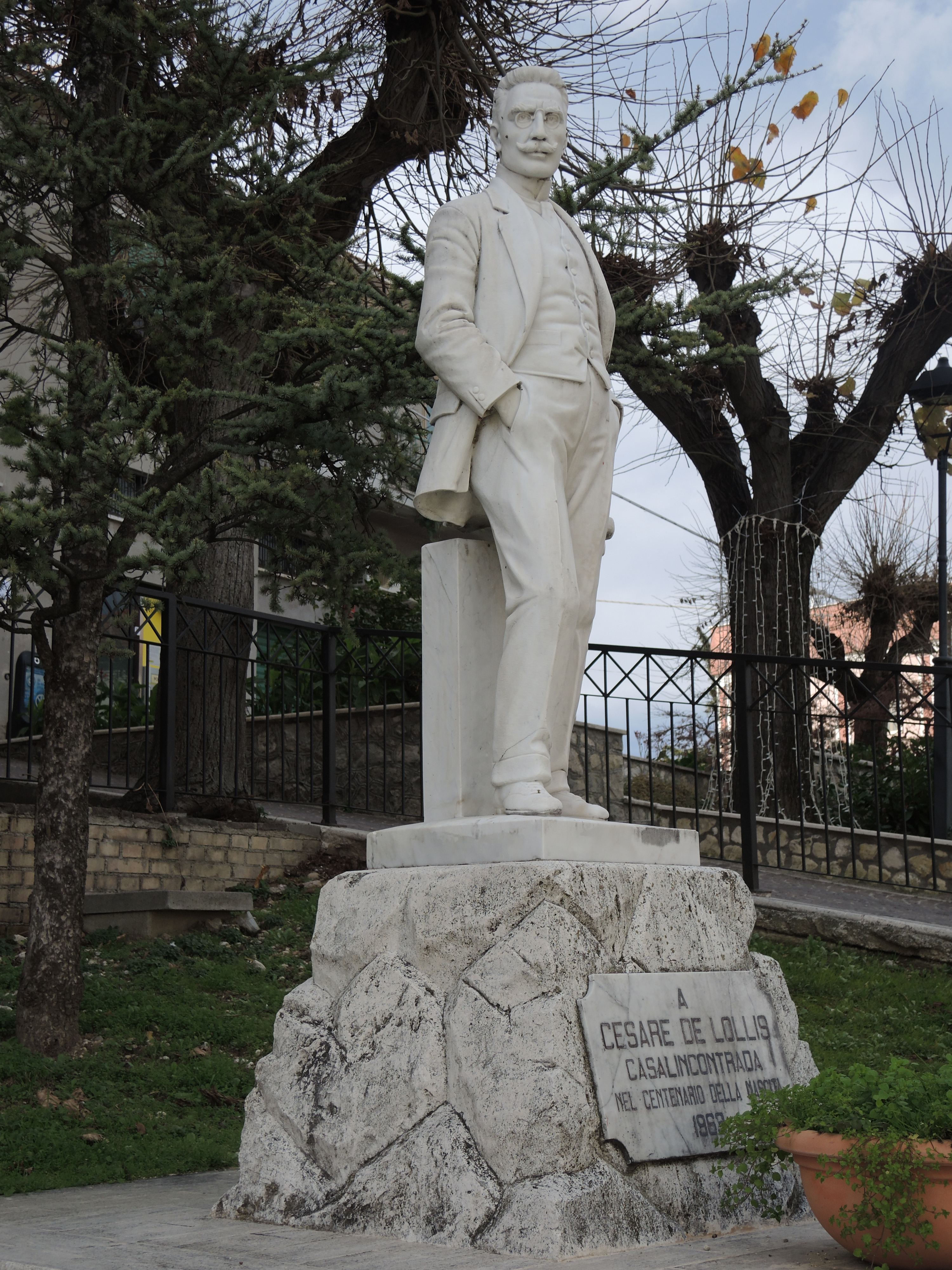 Casalincontrada; Monumento a Cesare De Lollis